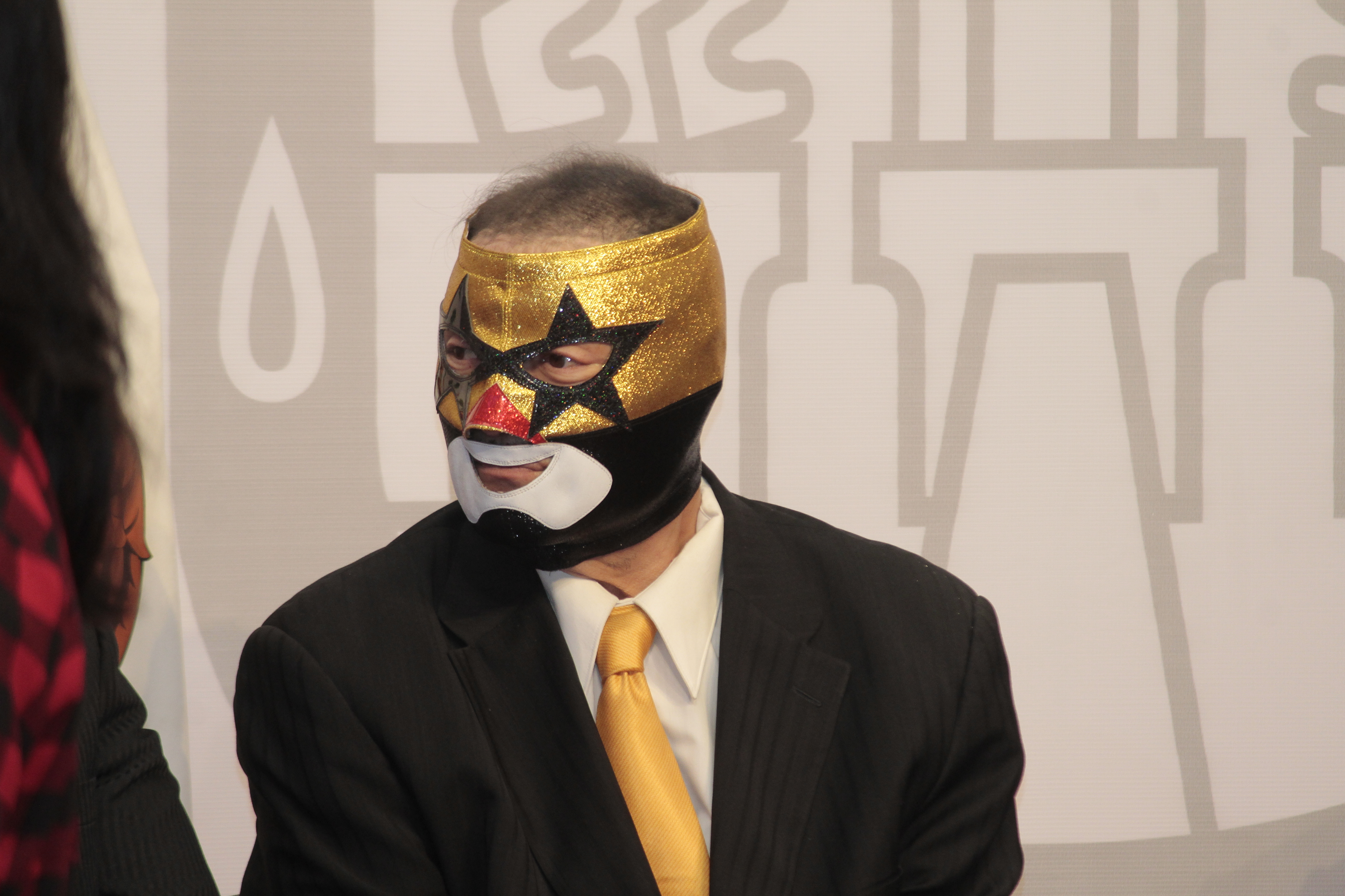 Le catcheur mexicain Super Muñeco.